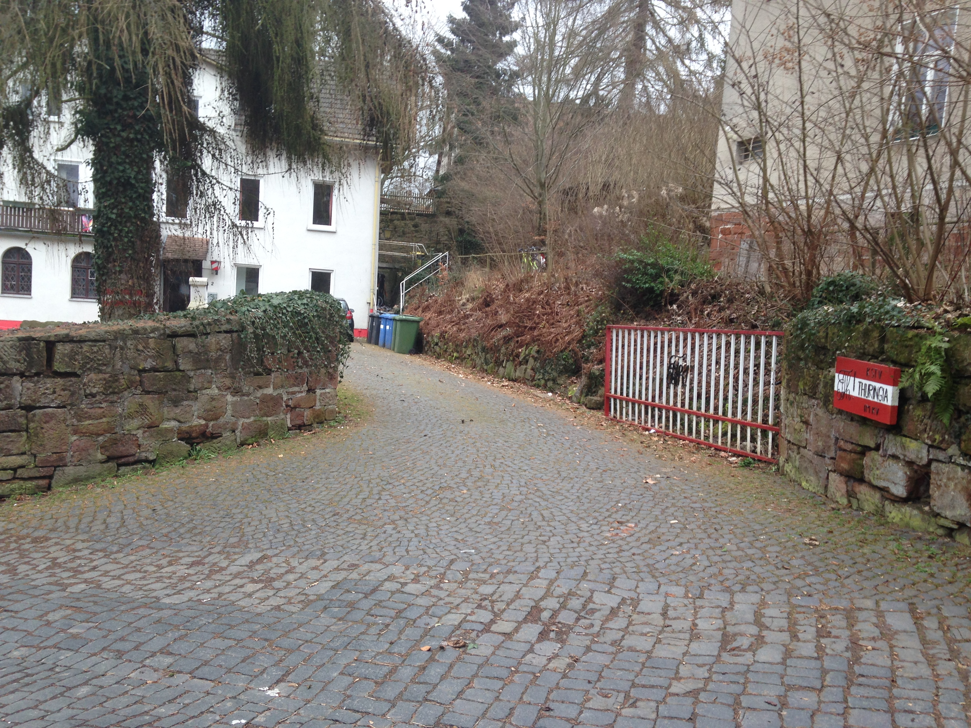 Verbindungshaus Thuringia